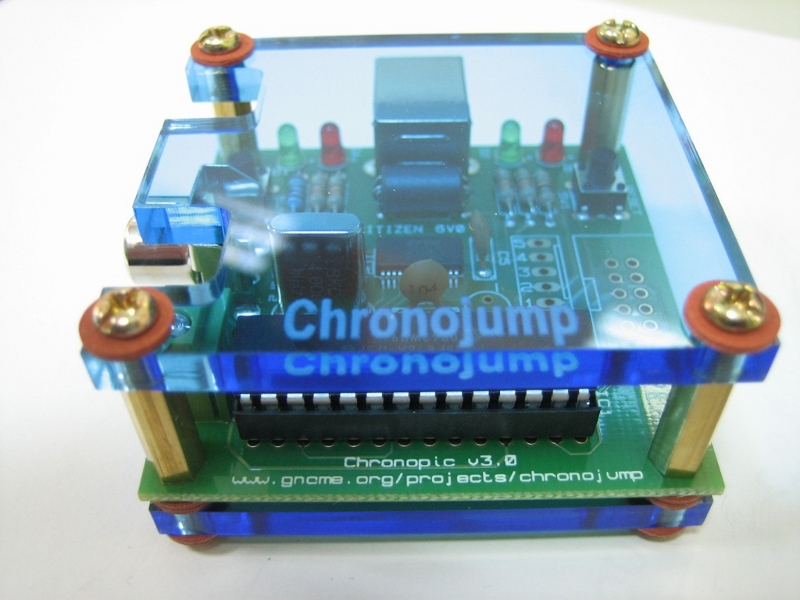 Fotografía de la placa de hardware abierto Chronopic3. Esta és usada por el proyecto de Chronojump para la medición de test deportivos de corta duración.